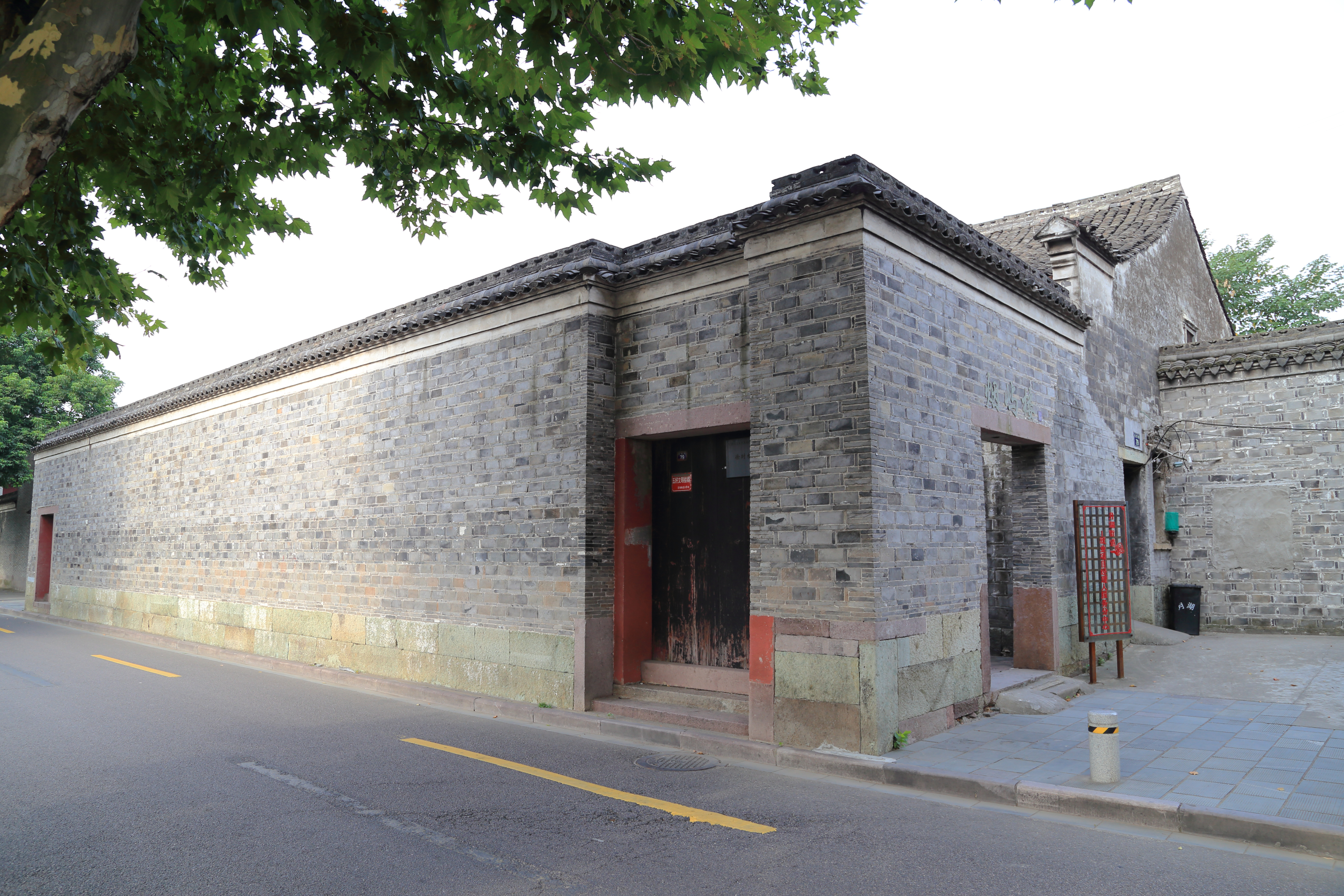 浙江省宁波市海曙区共青路79号徐时栋故居